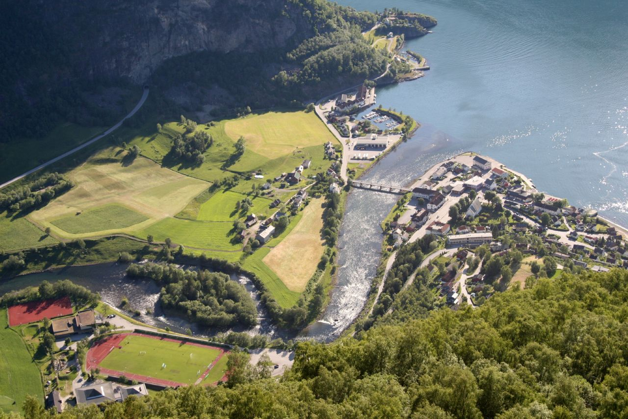 Aurlandsvangen